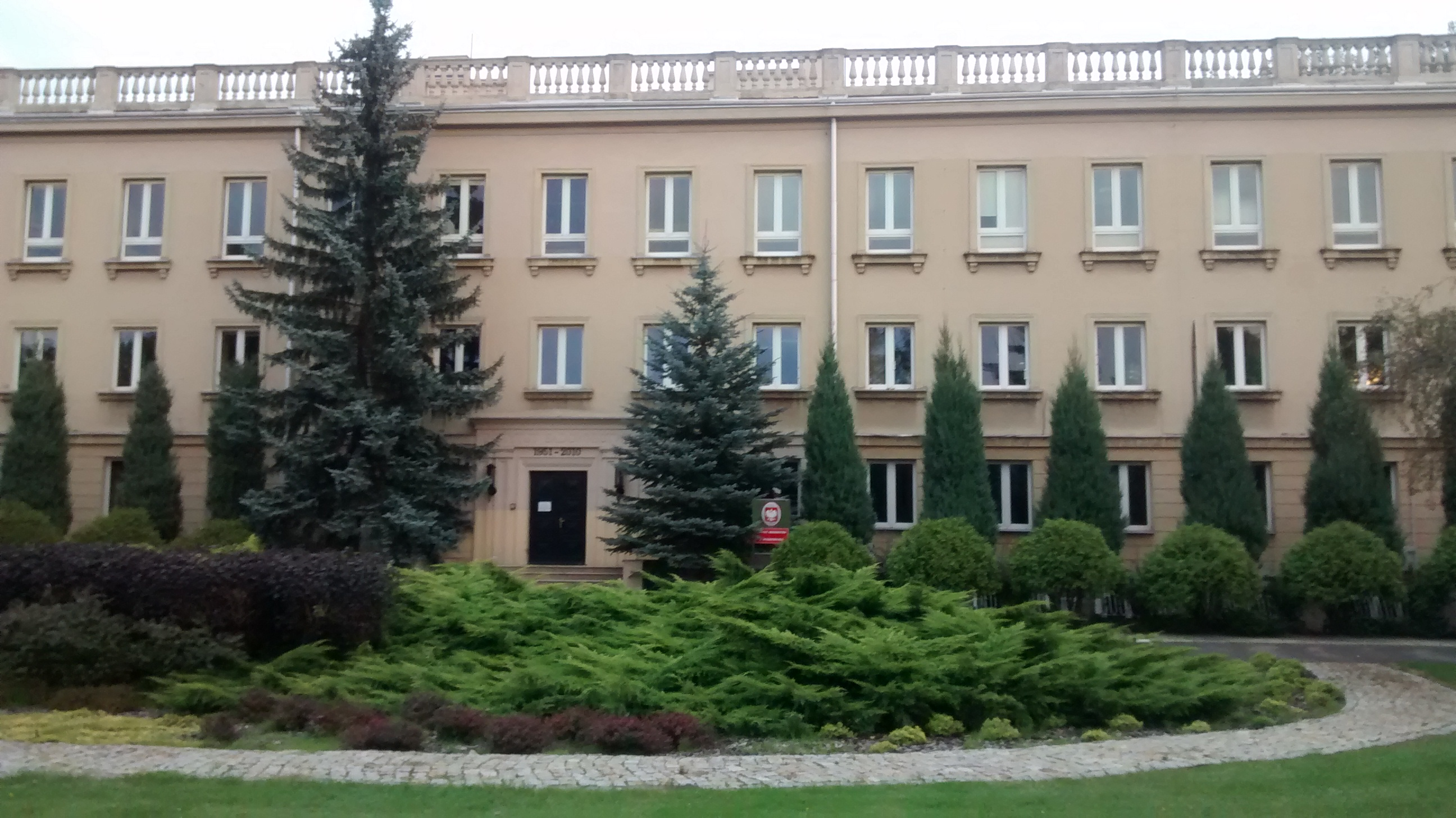 Instytut Sadownictwa i Kwiaciarstwa